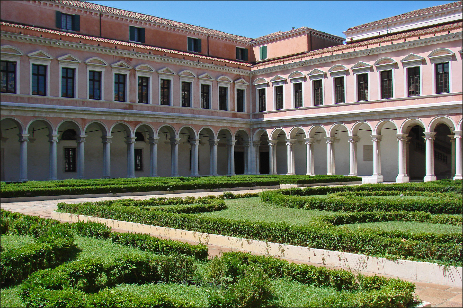 Le cloître des lauriers et le nouveau dortoir ont été construits par les Buora, ils s'ajoutent au cloître des cyprès achevé en 1561 par Palladio qui a travaillé à l'aménagement du couvent des Bénédictins jusqu'à sa mort. Le monastère bénédictin situé sur l'île de San Giorgio Maggiore, a été restauré par la fondation Cini qui y est installée. Cette île est en face du palais des Doges. C'est dans le réfectoire de ce monastère que se trouvait, avant les pillages de Napoléon, le célèbre tableau de Véronèse : "Les noces de Cana", aujourd'hui au Louvre. Site de la fondation Cini